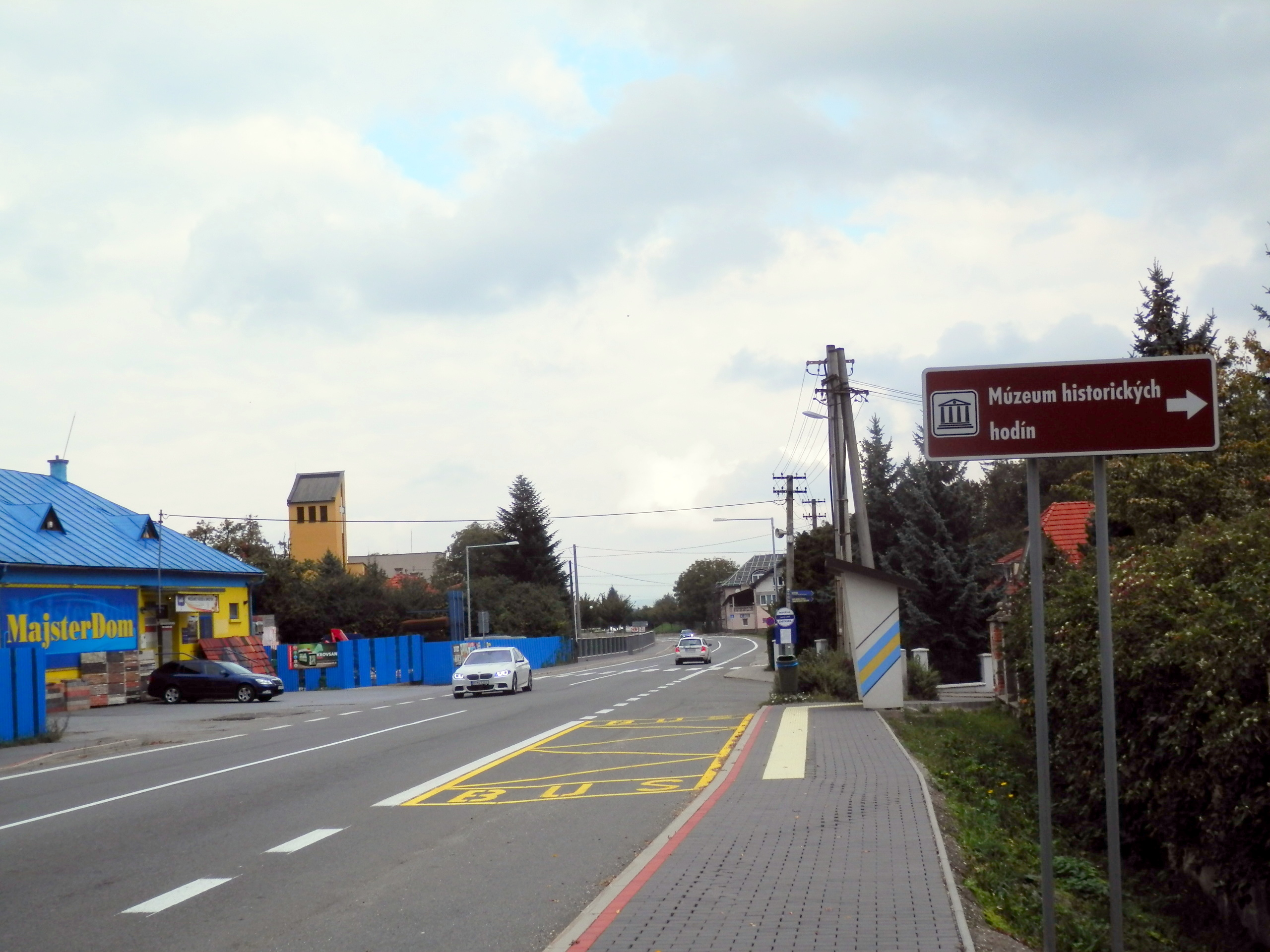 Intravilán obce Budimír. Okres Košice-okolie. Slovensko